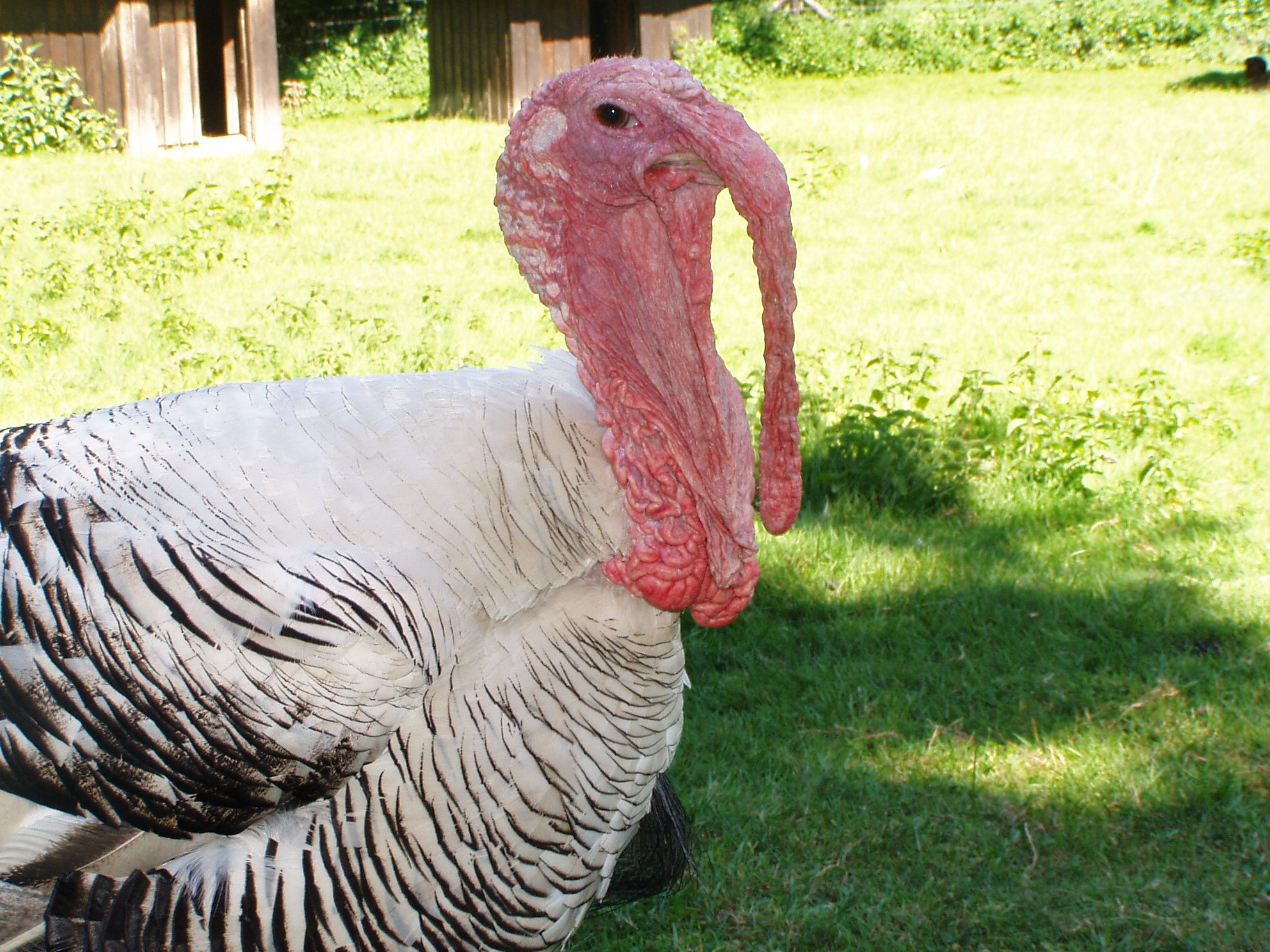 Dindon dans le parc près du Lac de Bambois (Belgique)